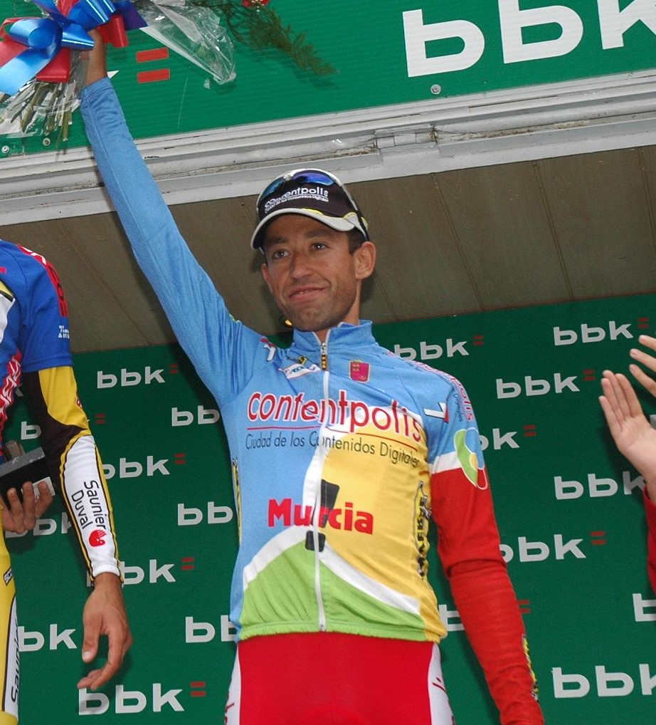 Adrián Palomares 3rd overall Euskal Bizikleta 2008.